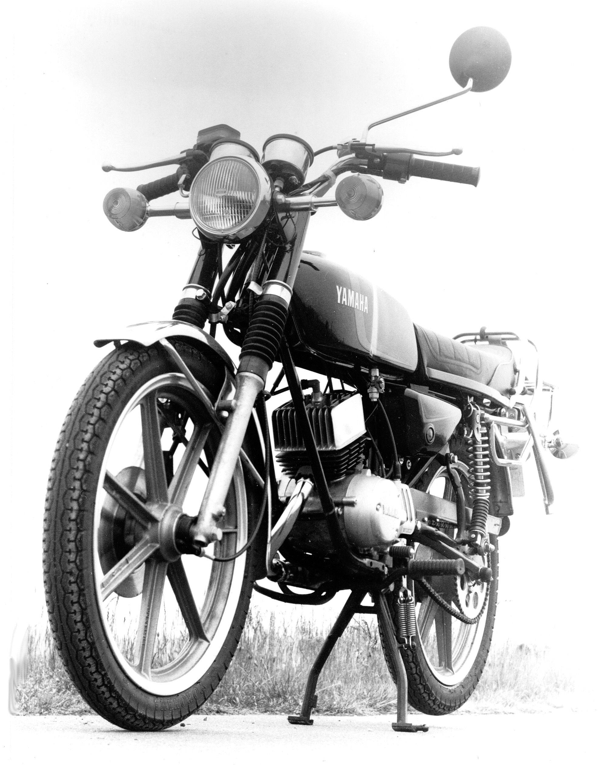 Yamaha RD 50 M Mokick des Baujahres 1980. Einzylinder-Zweitaktmotor mit Luftkühlung, Fünfganggetriebe mit Fußschaltung. Lackierung schwarz/rot, Leichtmetallfelgen goldfarben.